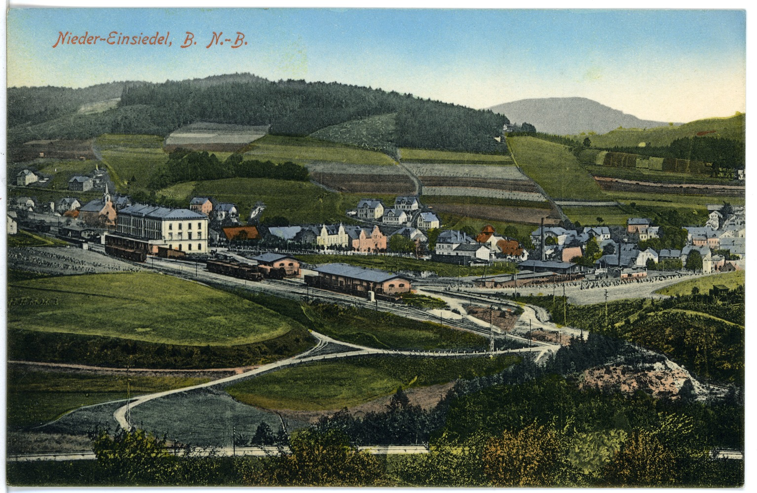 Nieder-Einsiedel; Blick auf Nieder-Einsiedel This postcard is from publisher Brück & Sohn in Meißen ( postcard has a unique number 16817 and is available in a higher resolution at the publisher. This images was uploaded in a cooperation project between Wikipedians and the publisher.